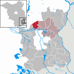 Drachhausen in Brandenburg (Country) - District Spree-Neiße